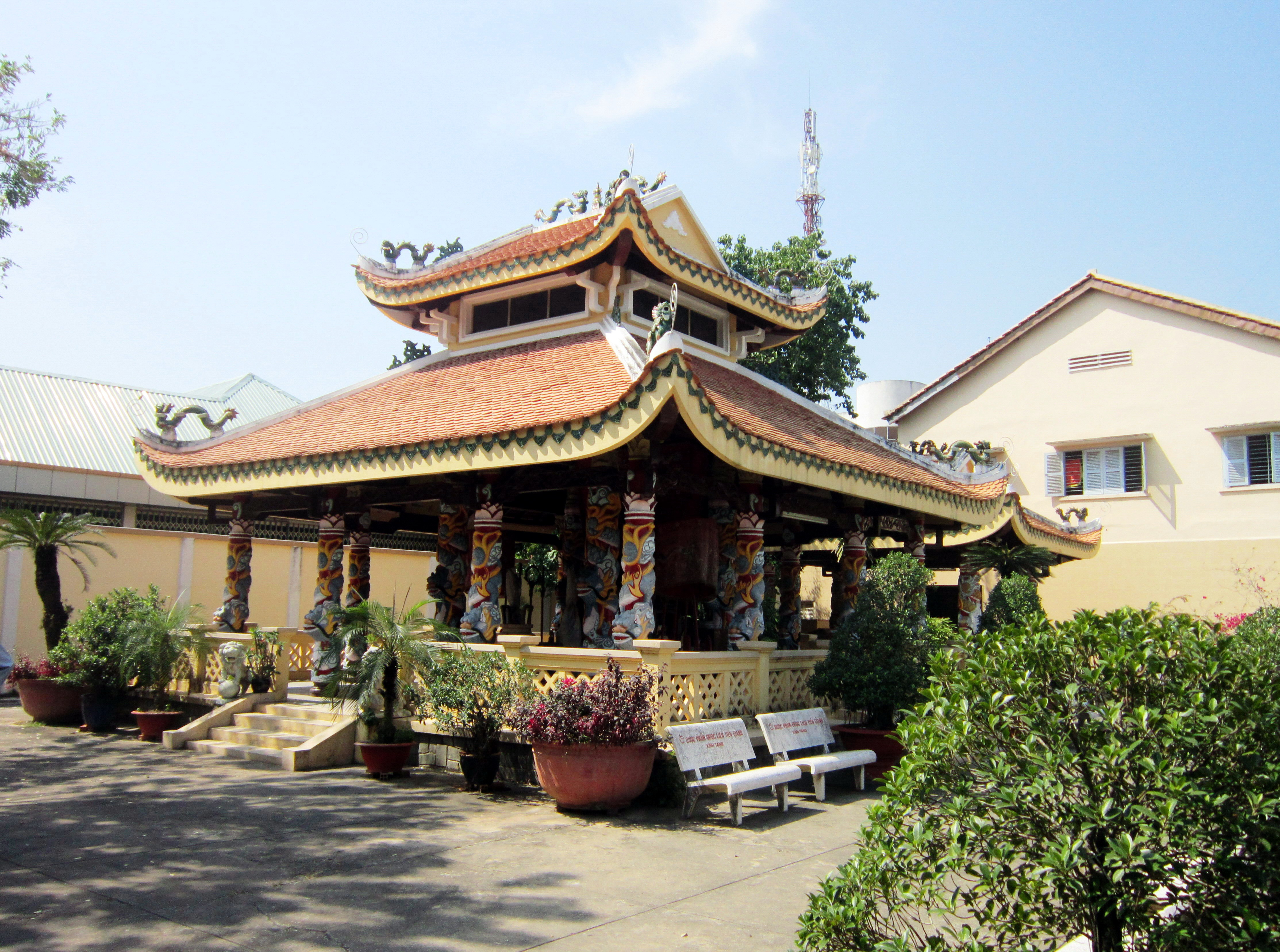 Lăng Tứ Kiệt tọa lạc tại đường 30-4, thị trấn Cai Lậy, huyện Cai Lậy, tỉnh Tiền Giang (Việt Nam). Nơi đây có nhà thờ và nhà mộ của Tứ Kiệt, là bốn vị anh hùng hào kiệt đã hy sinh trong công cuộc chống Pháp xâm lược trong quãng thời gian 1868 -1871.